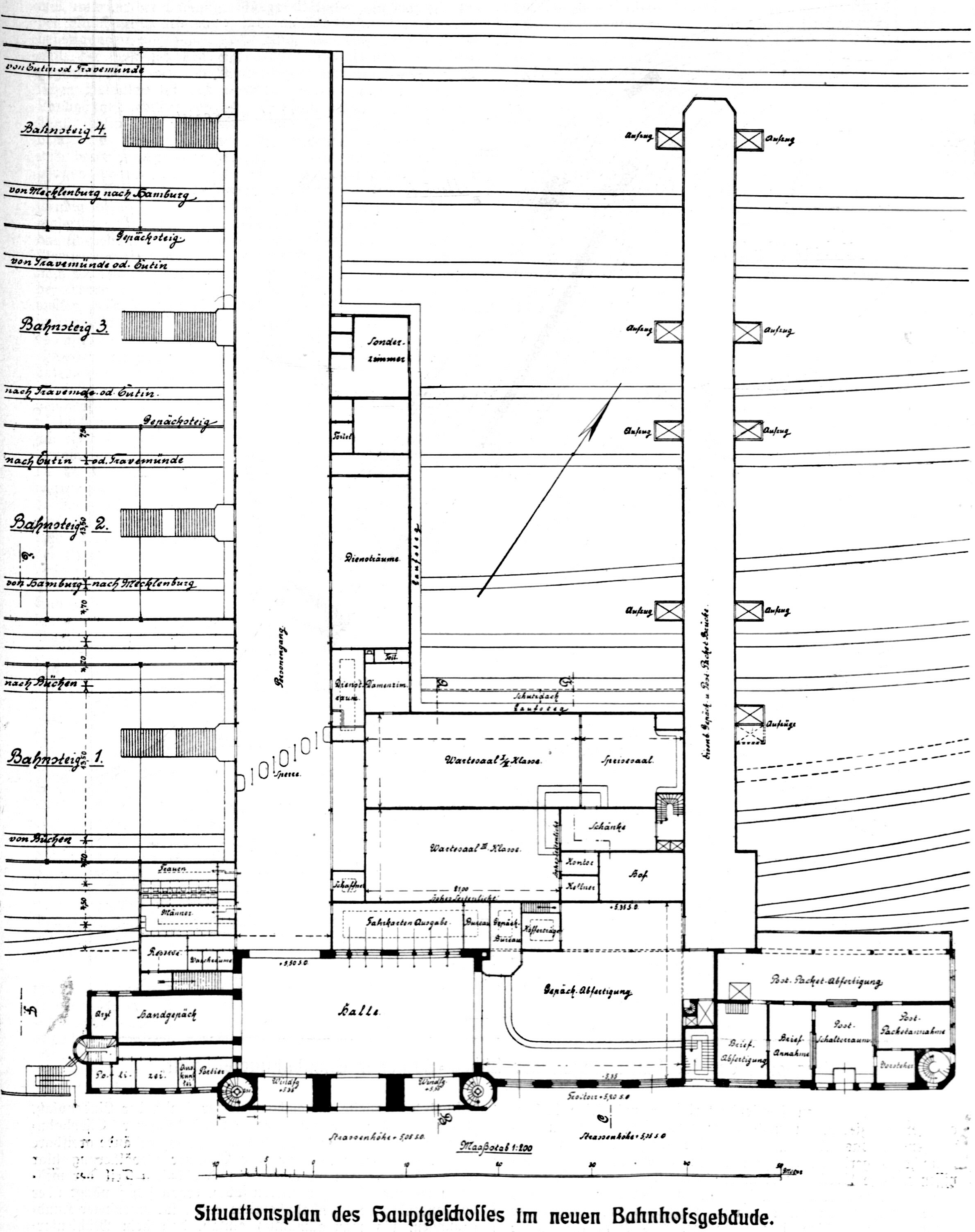 Situationsplan des Hauptgeschosses im neuen Bahnhofsgebäude